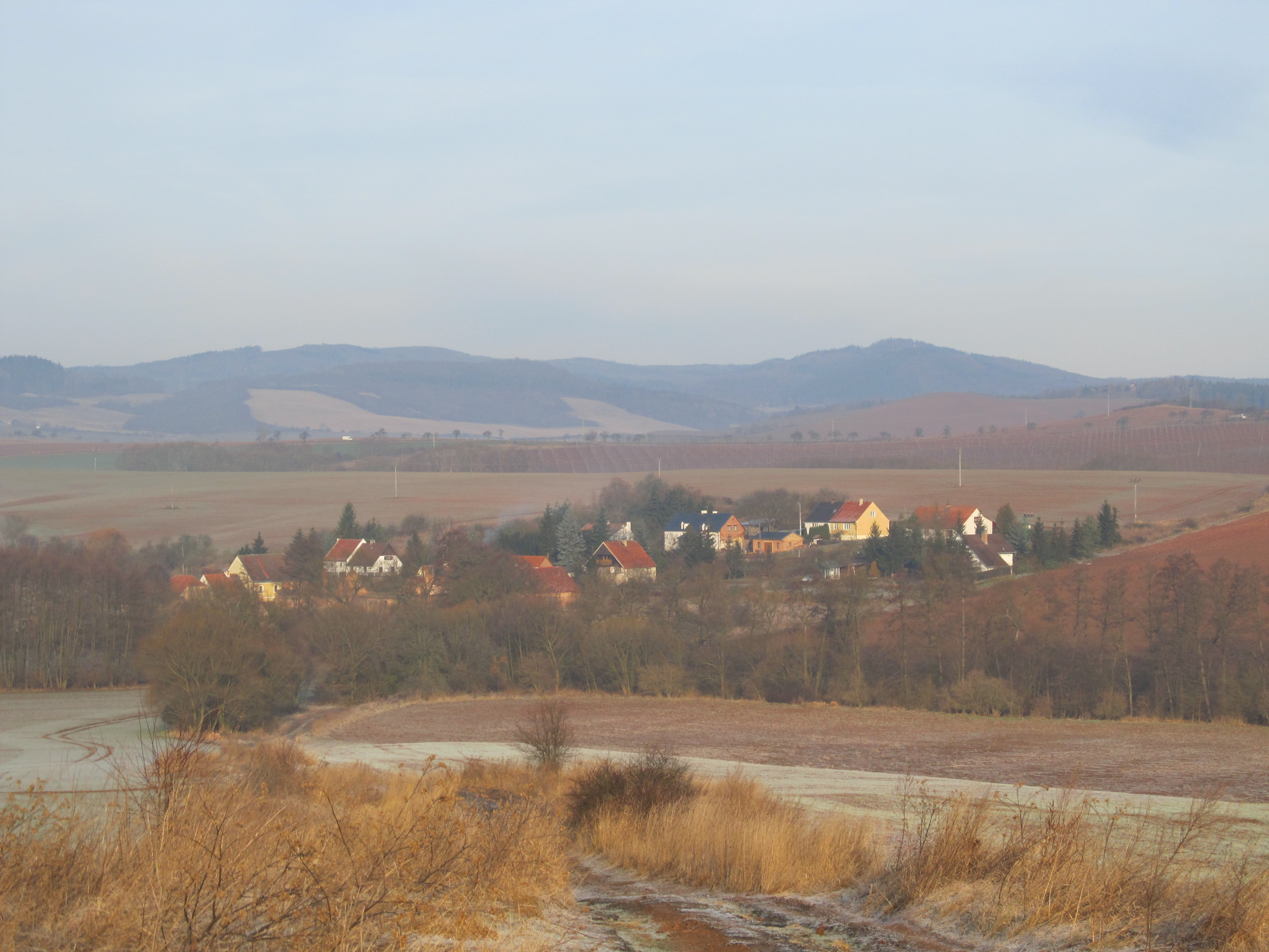 Řepany z cesty od Ležek